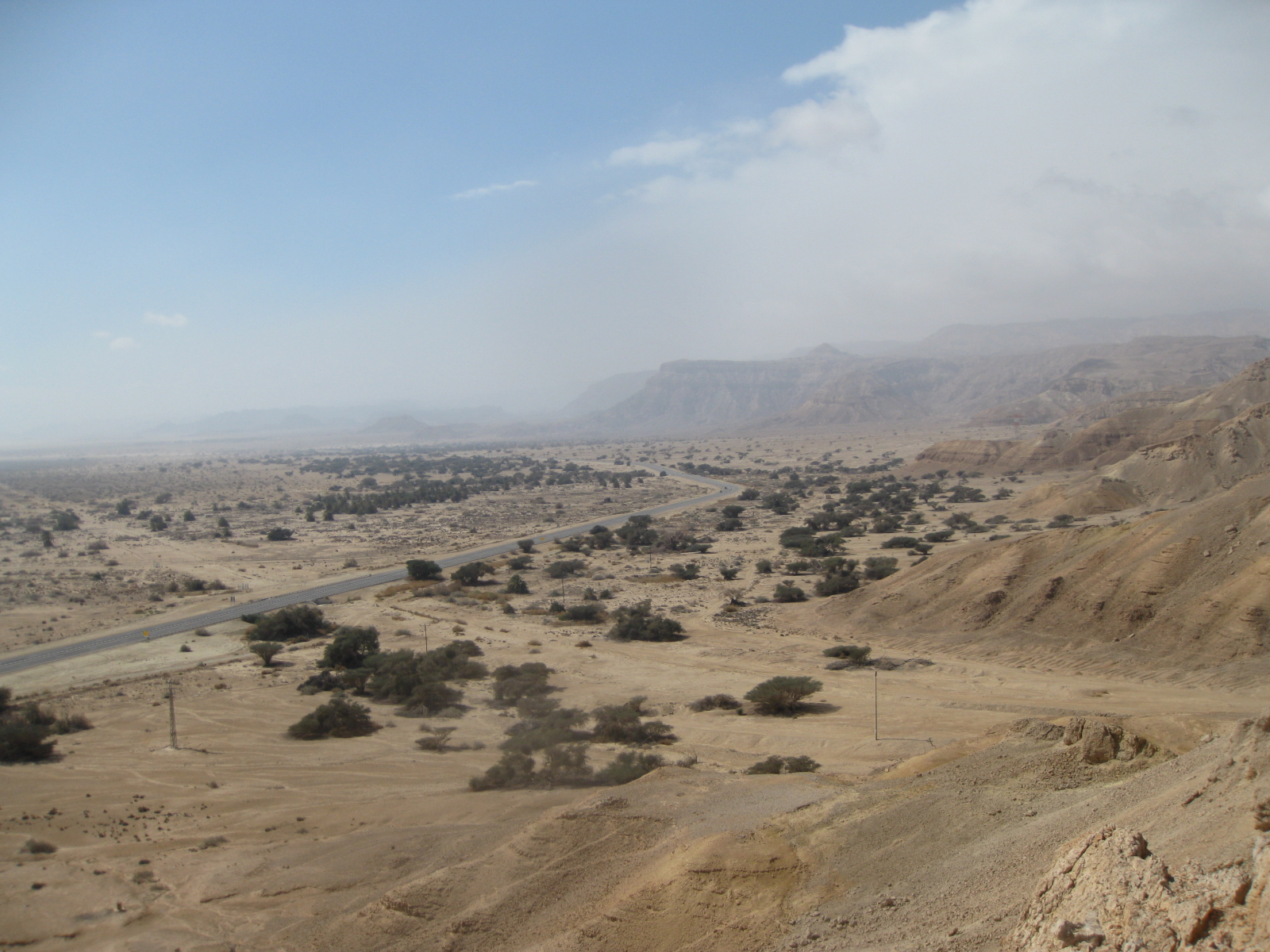 מבט מן המצודה דרומה. נווה יטבתה ומרחבי הערבה הדרומית נשקפים מראש הגבעה